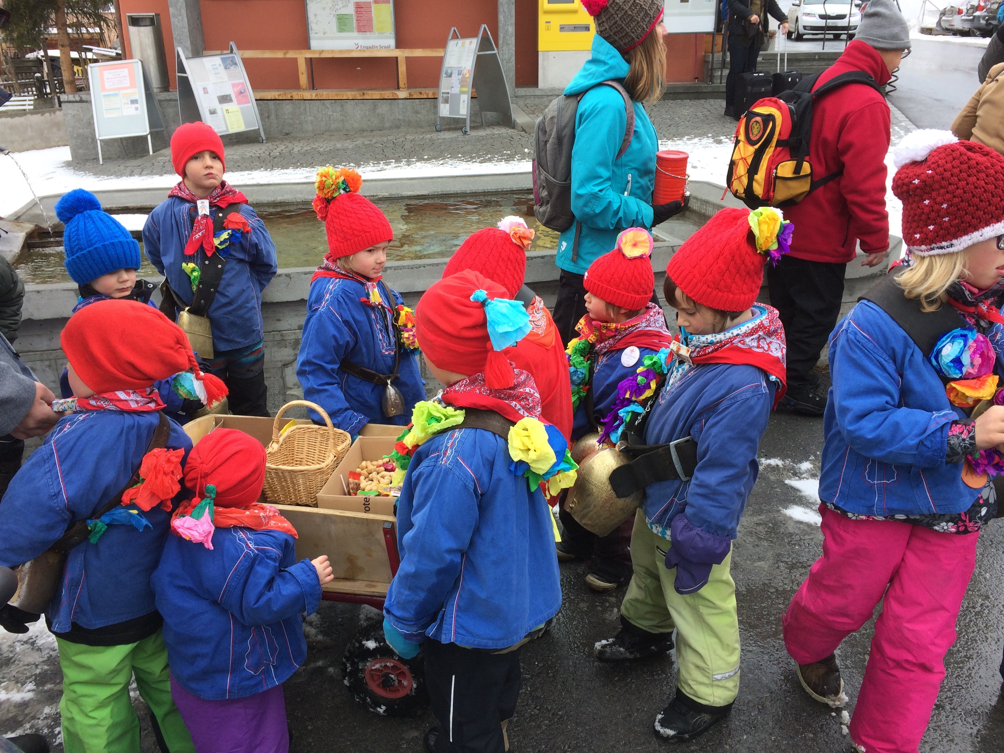 Chalandamarz 2017 in Ftan (Unterengadin)